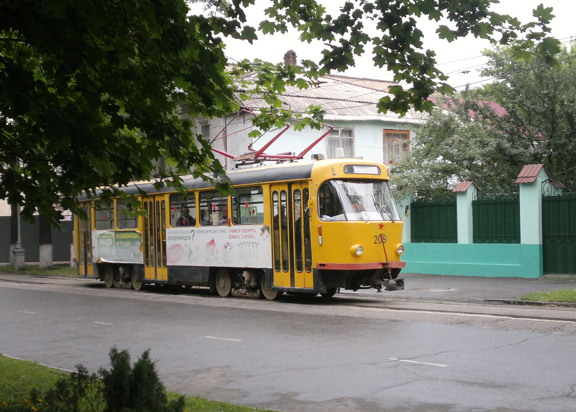 Владикавказский трамвай